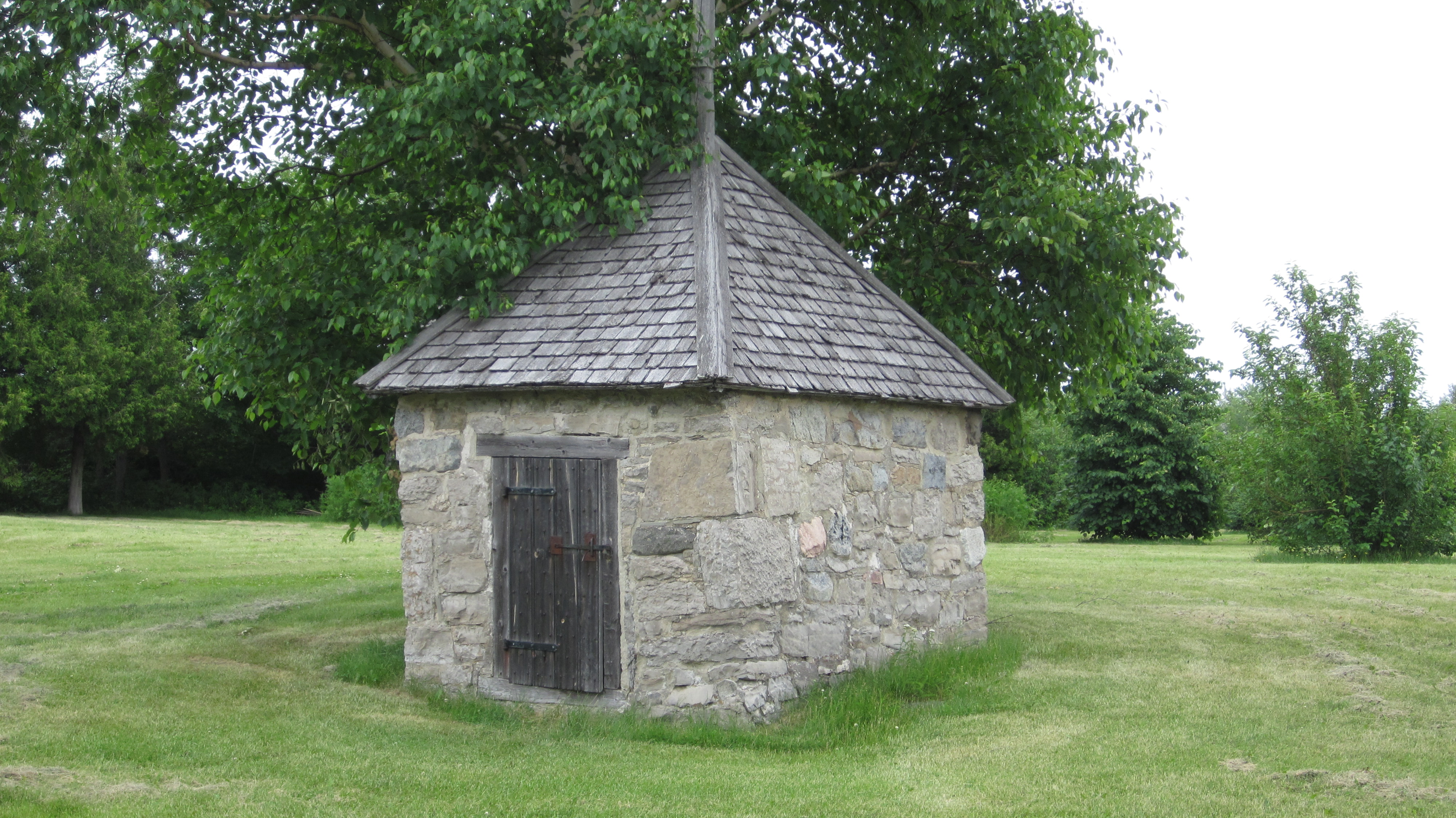 La poudrière est le seul bâtiment qui subsiste du poste de traite de la Métabetchouane; elle a été classé monument historique en 1967